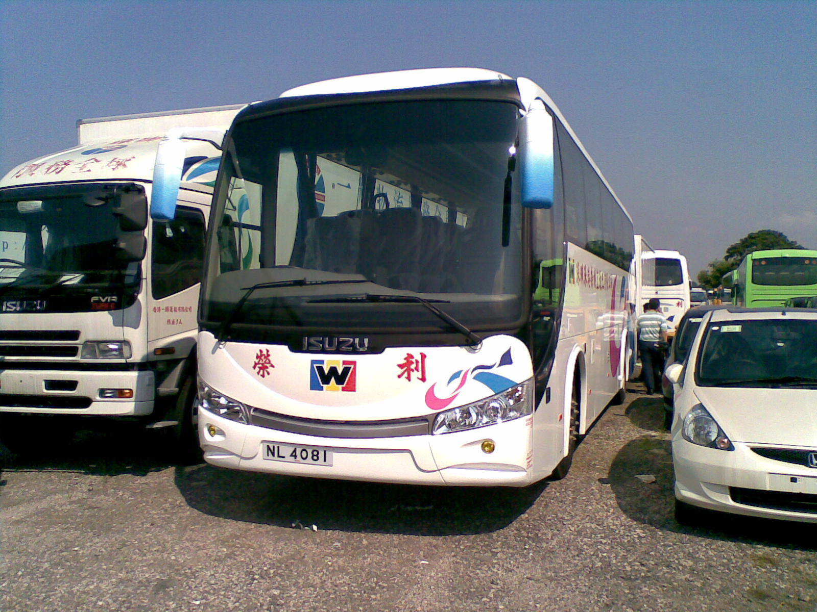 いすゞLV423Rがホンコンにある。